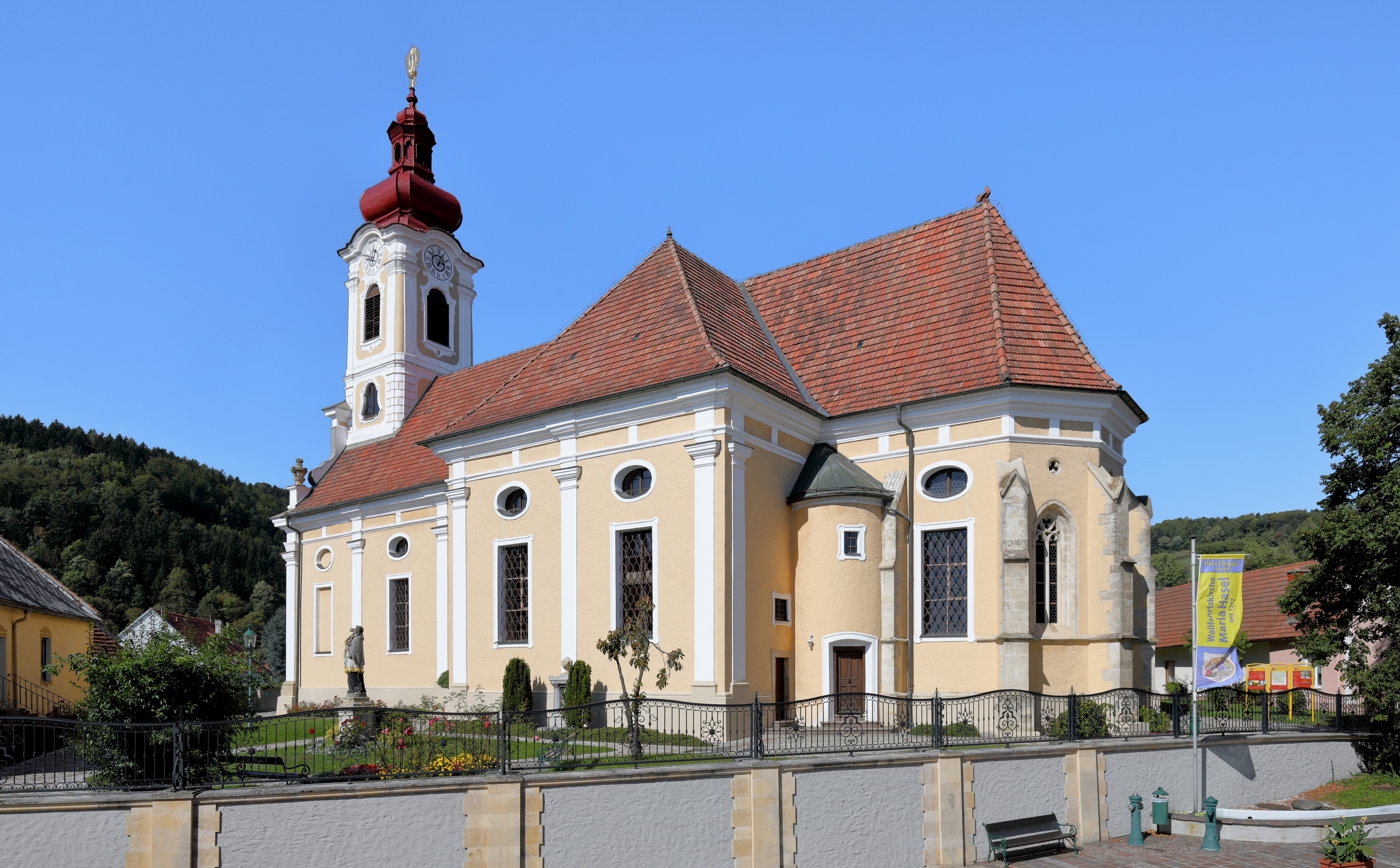 Südostansicht der röm.-kath. Pfarr- und Wallfahrtskirche Maria Hasel in der österreichischen Marktgemeinde Pinggau in der Steiermark. Erbaut wurde die ursprünglich gotische Kirche vermutlich Anfang des 14. Jahrhunderts und von 1703 bis 1706 im Stil des Barocks umgebaut sowie erweitert.